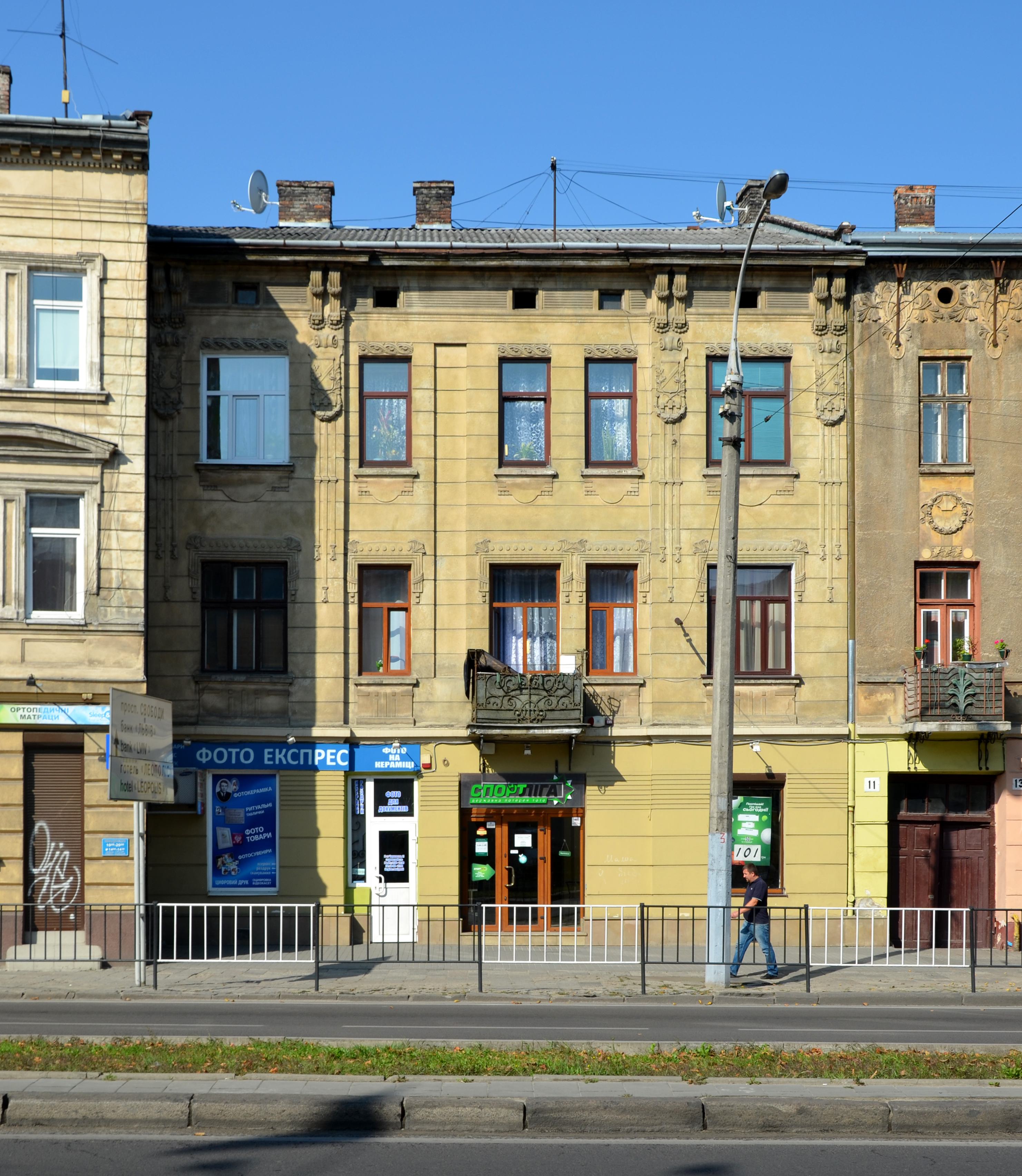 Дім на проспекті Чорновола, 11 у Львові.